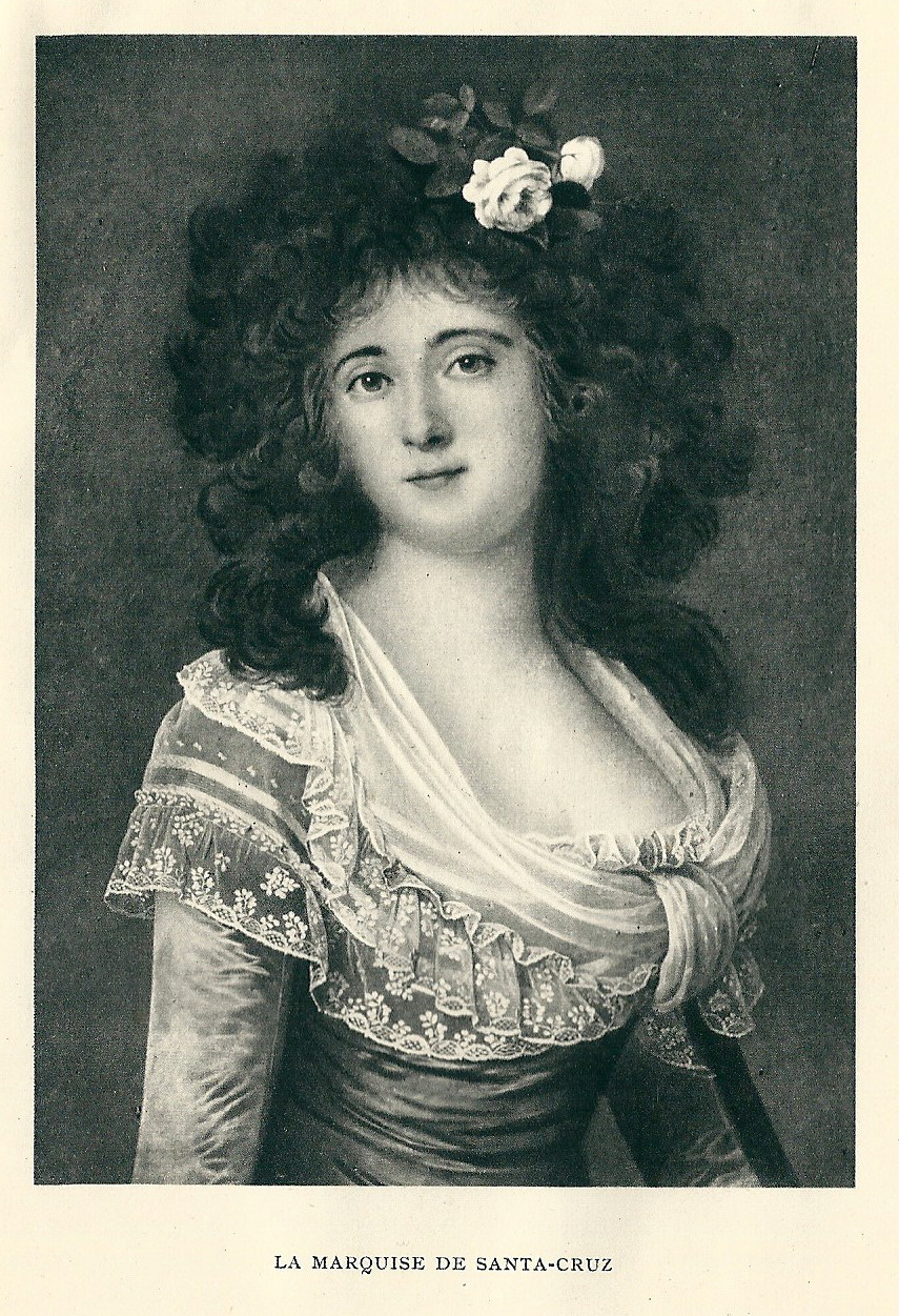 Mariana Waldstein-Wartenberg (1763-1808), neuvième marquise de Santa Cruz